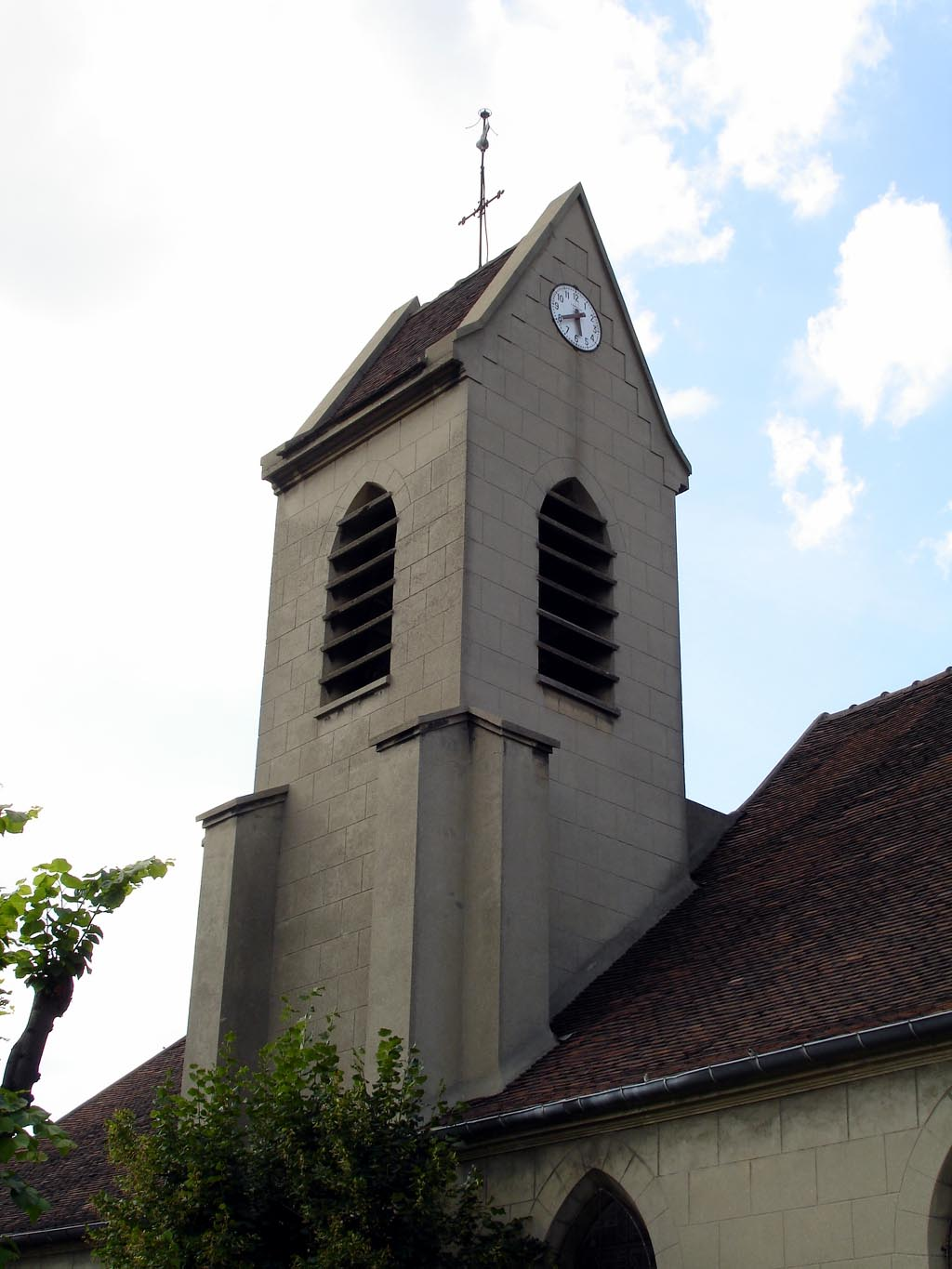 Clocher de l'église Saint-Martin à Garges-lès-Gonesse (Val-d'Oise), France Vieux-Pays Août 2007 Photo personnelle (own work) de Clicsouris